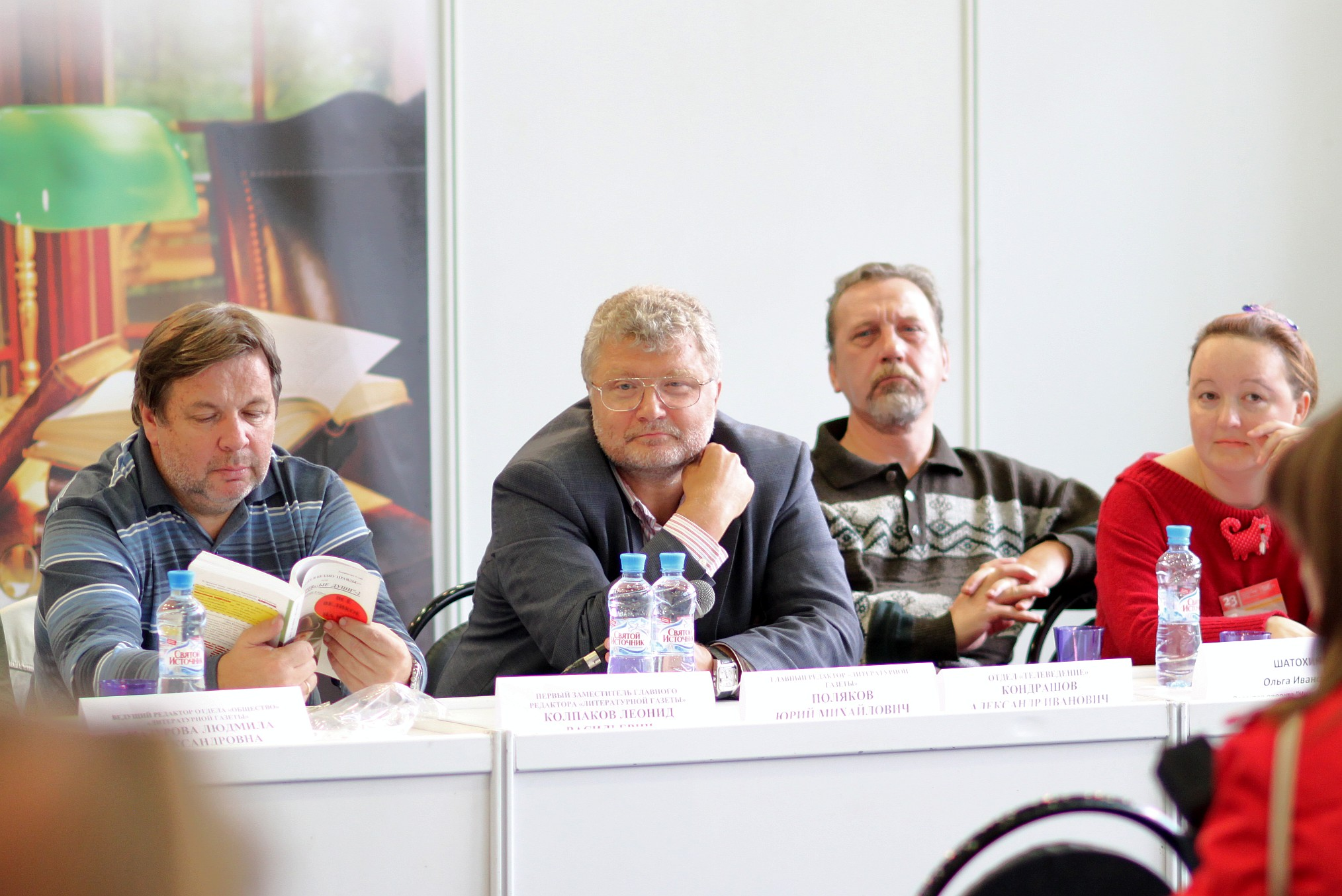 Literaturnaya Gazeta editorial board (2010, September)